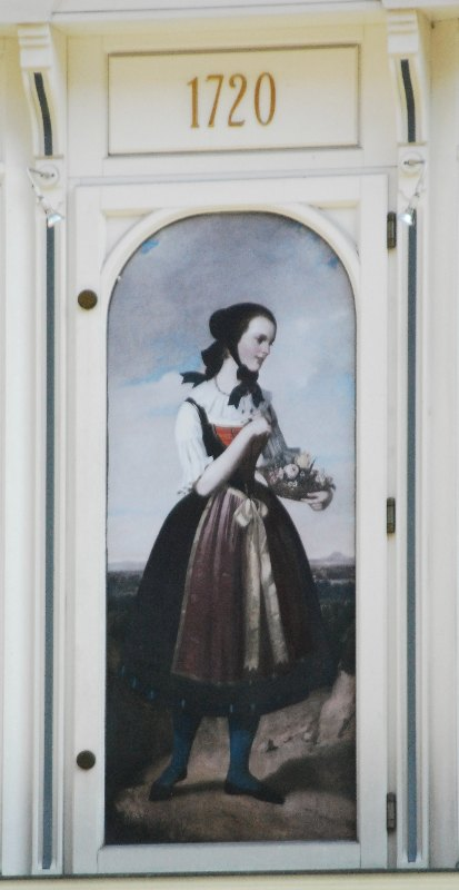 Gemälde der Schwäbischen Jungfrau beim gleichnamigen Geschäft am Graben in Wien.